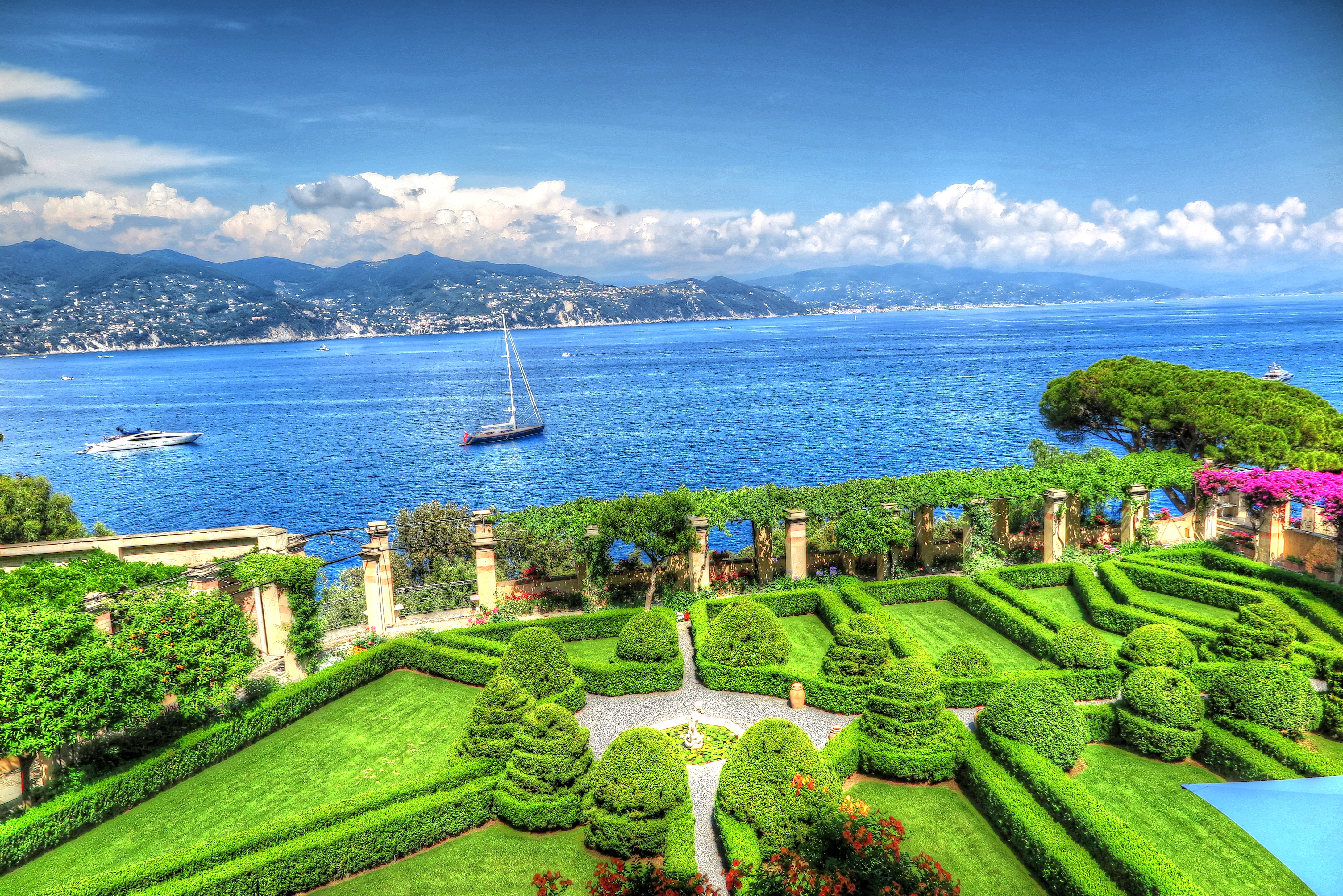 La Cervara - Abbazia di San Girolamo al Monte di Portofino This is a photo of a monument which is part of cultural heritage of Italy.